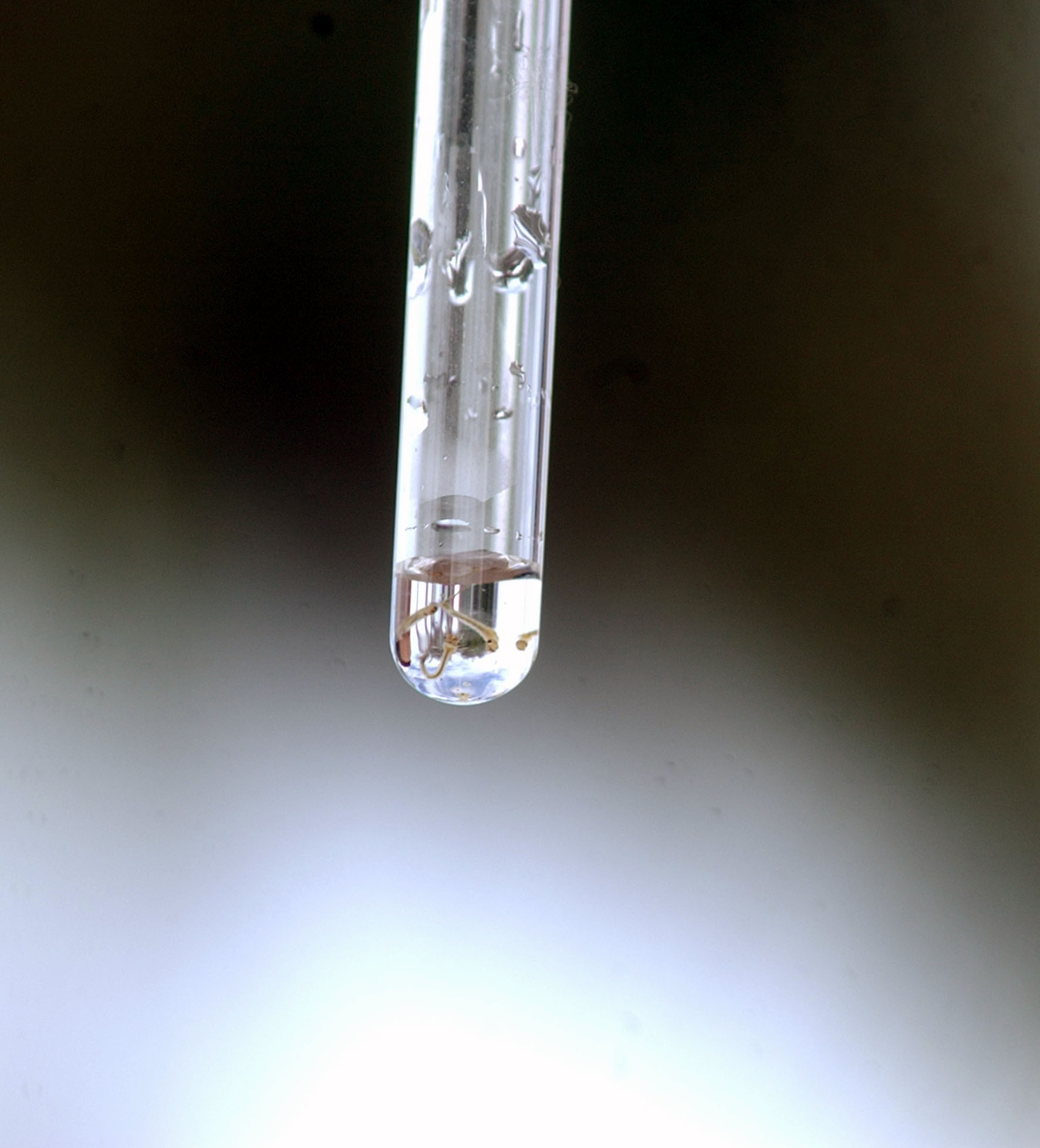 Larva do mosquito Aedes aegypti